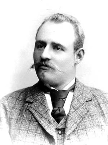 Fotografi